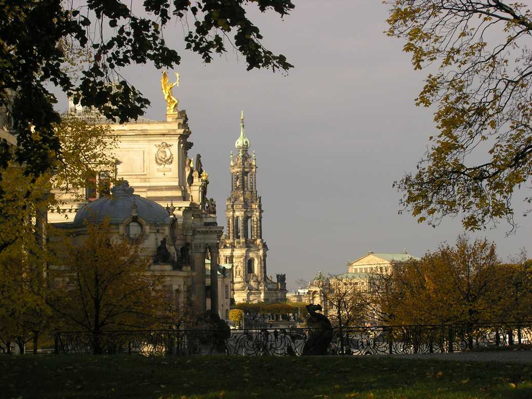 Dresden Kathedrale vom Brühlschem Garten Herbst 2003